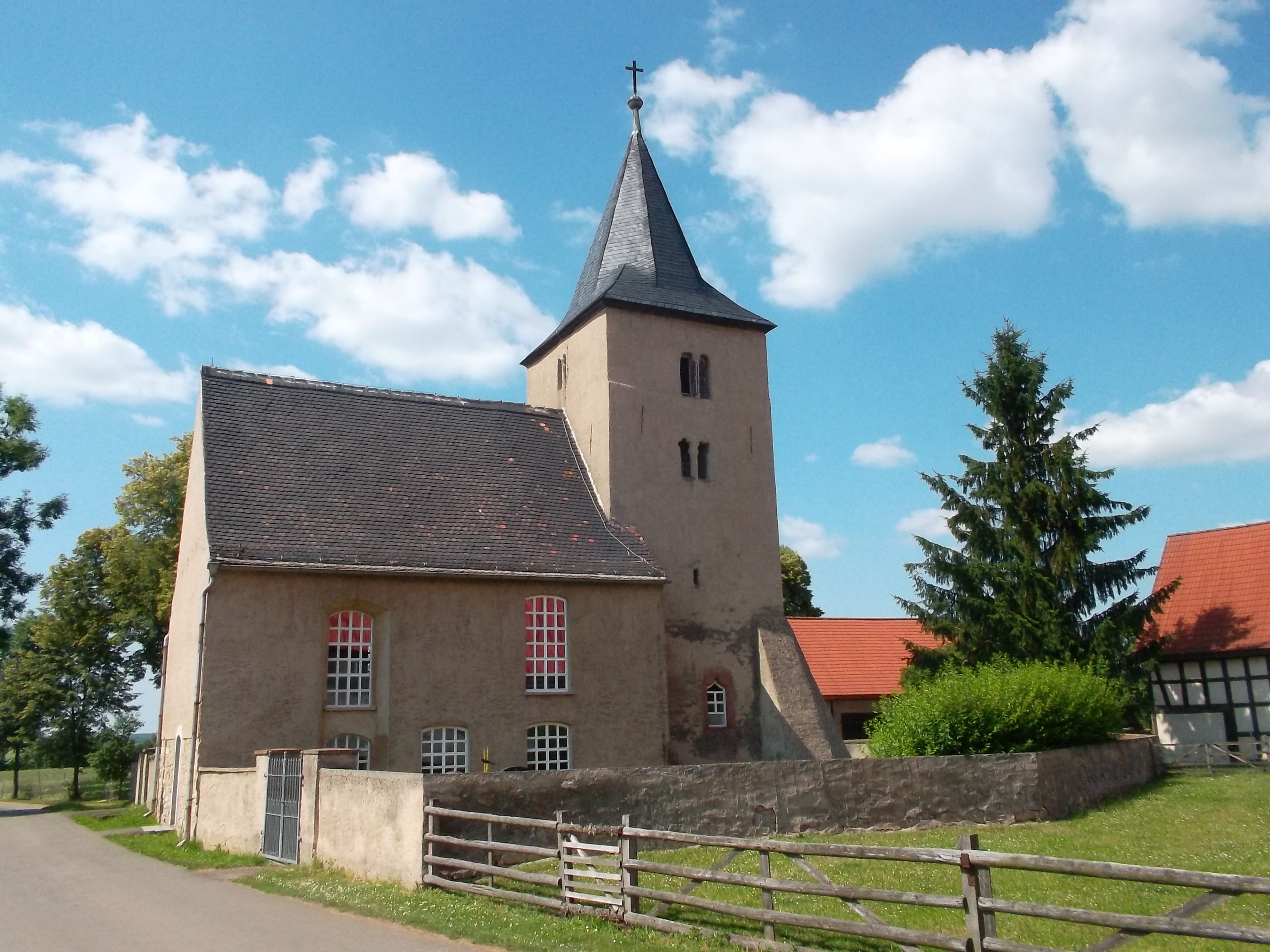 2013 in Mückern